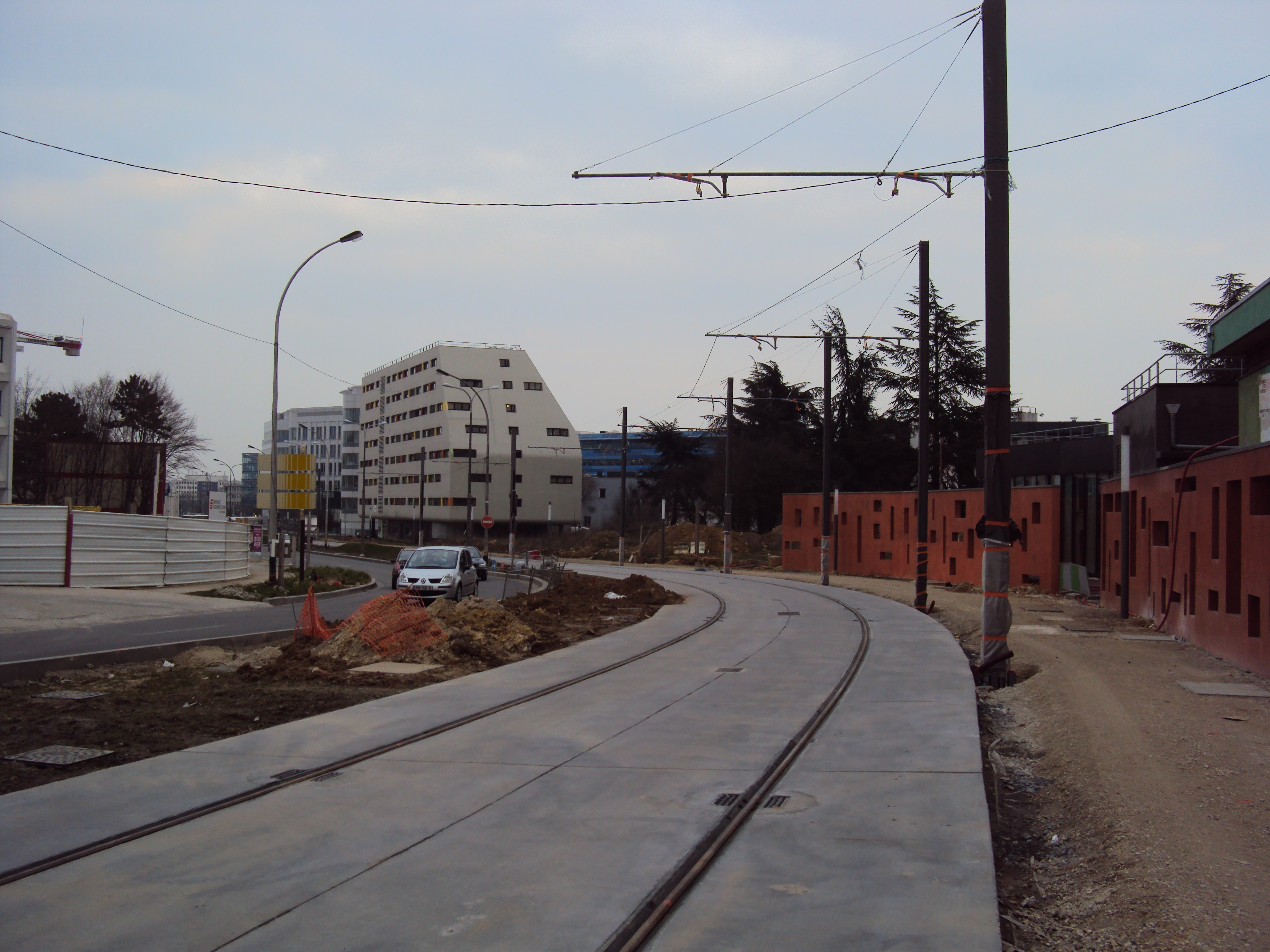 chantier T6 Velizy - mars 2013